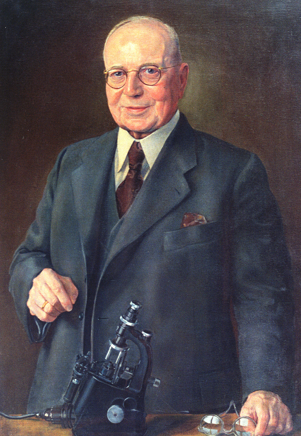 Prof. Hermann Pistor in der Optikerschule.